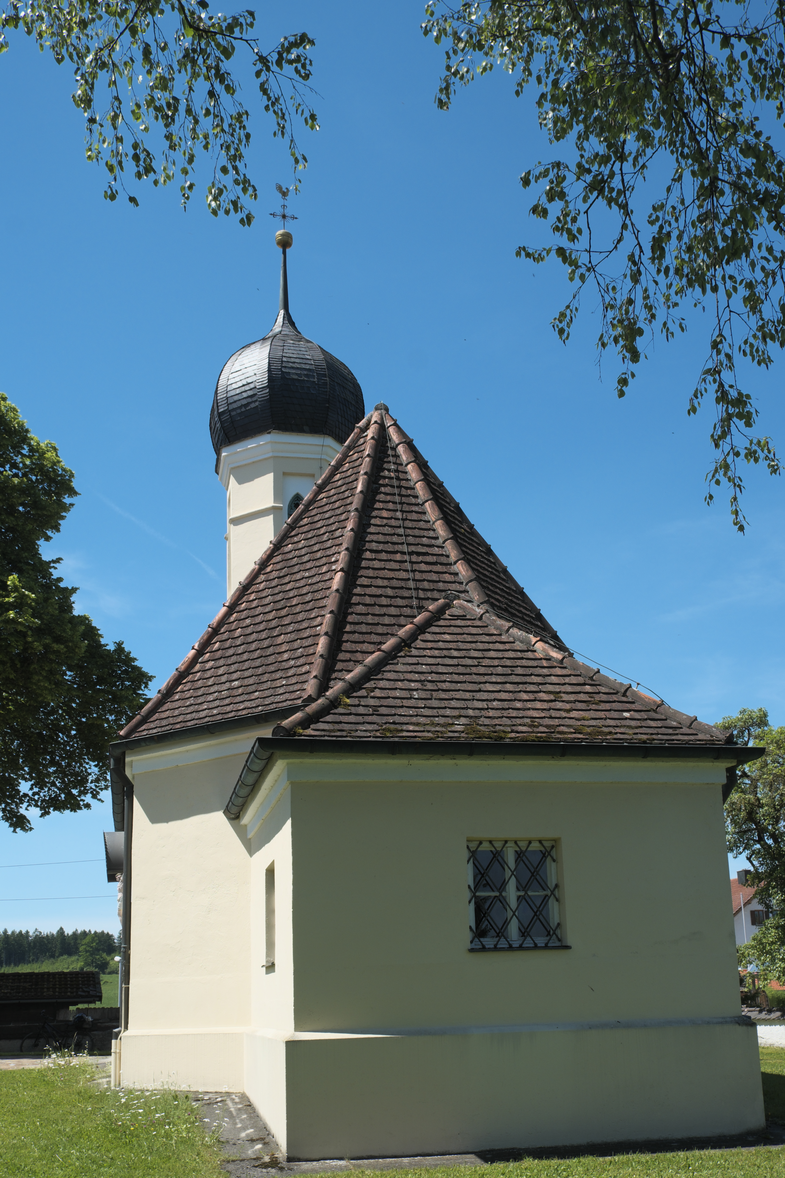 Kapelle St. Michael in Schlagenhofen (Inning am Ammersee) im Landkreis Starnberg (Bayern, Deutschland)